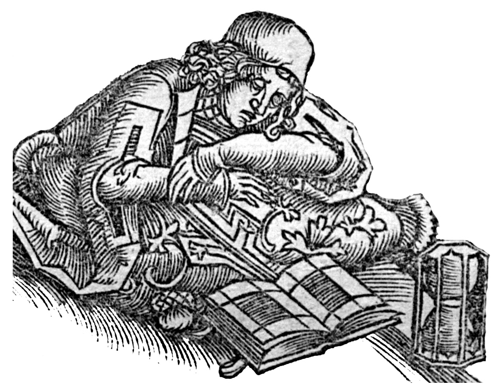 Autorenportrait